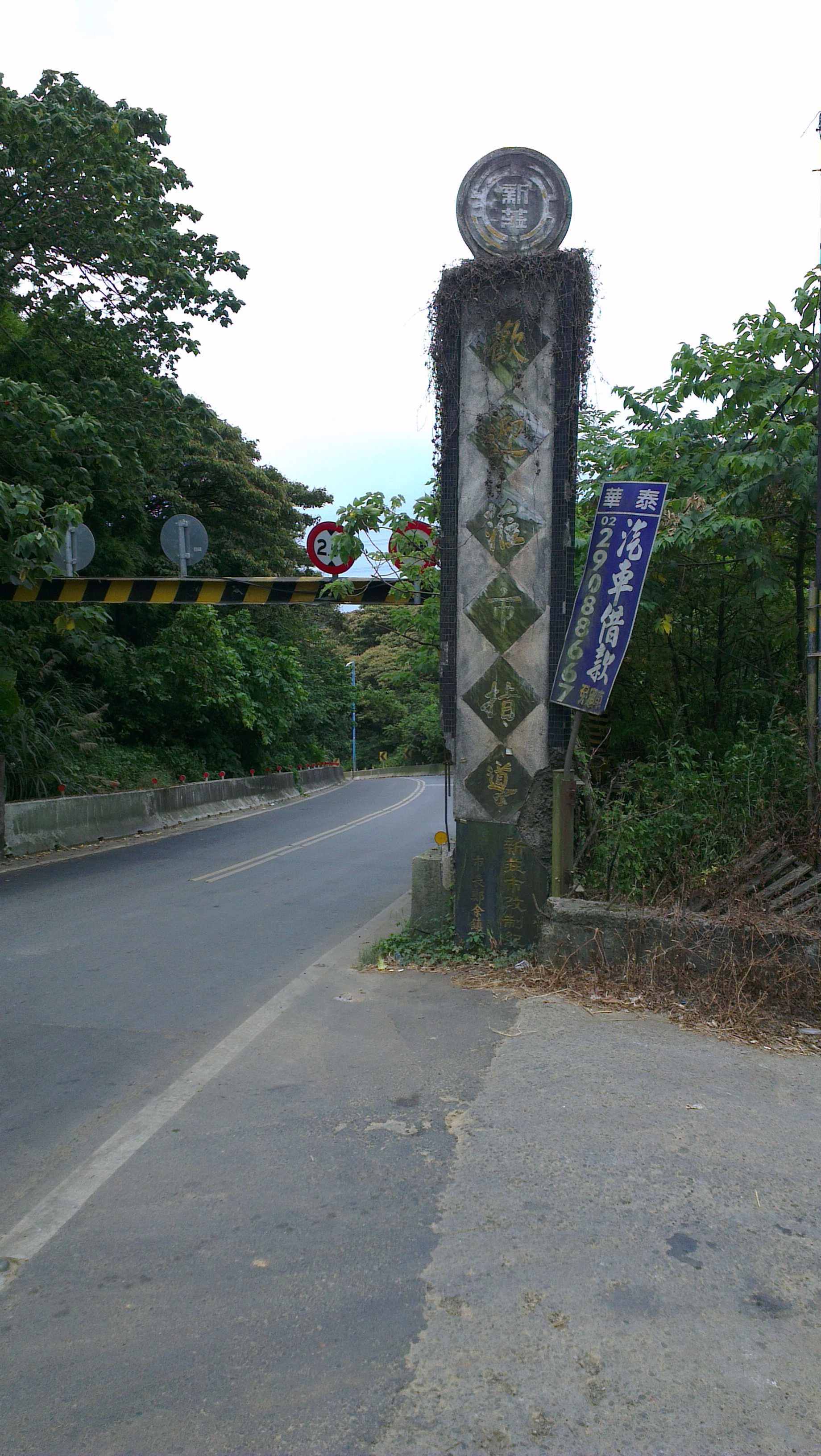 中文（台灣）: 新莊市改制記念碑往新莊方向